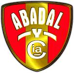 Logo der Marke Abadal